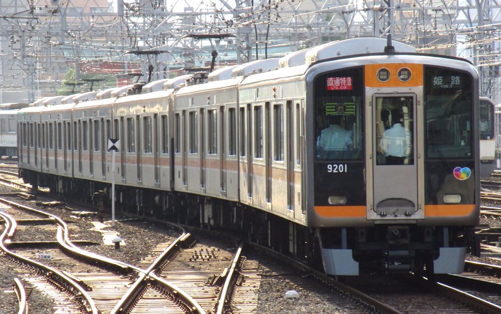 阪神9000系9201編成 直通特急姫路行き